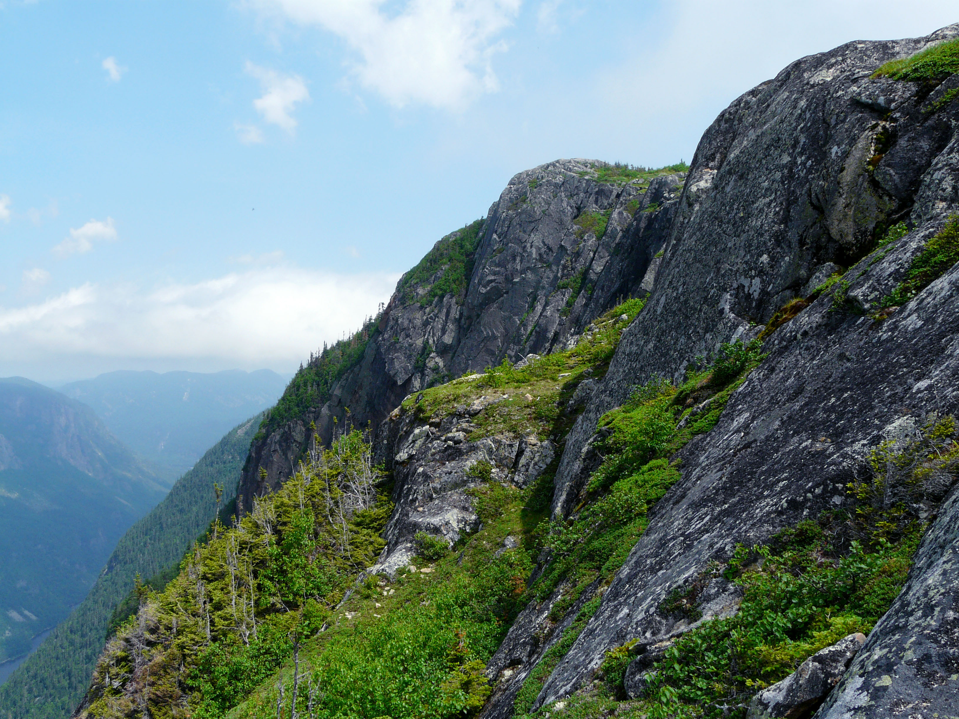 Montagne des Érables, Charlevoix